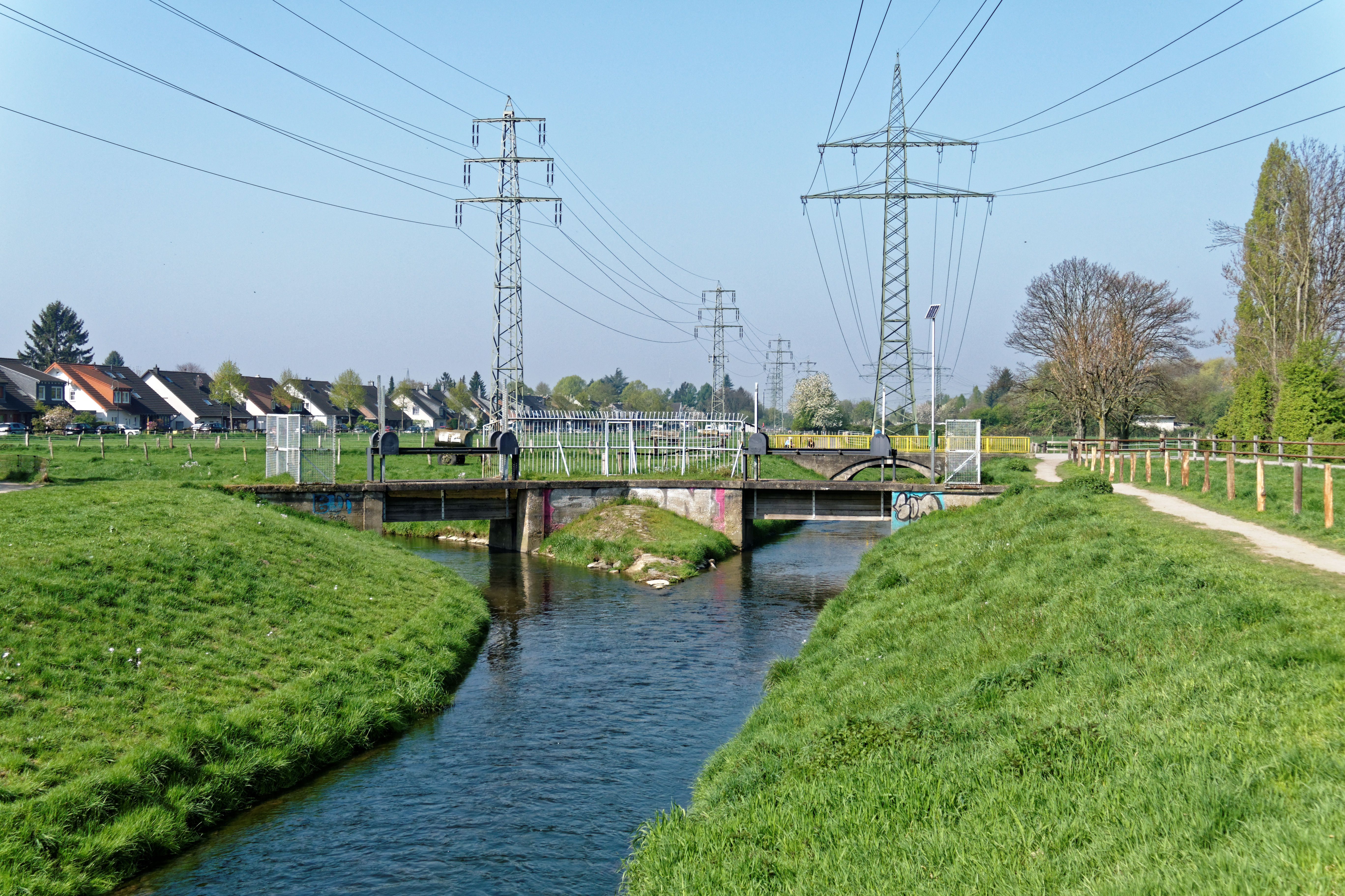 Teilung der Düssel in die Südliche (links) und Nördliche Düssel (rechts) in Düsseldorf-Gerresheim; 110-kV-Leitung (Bl. 0021) und 110-kV-Bahnstromleitung (rechts)